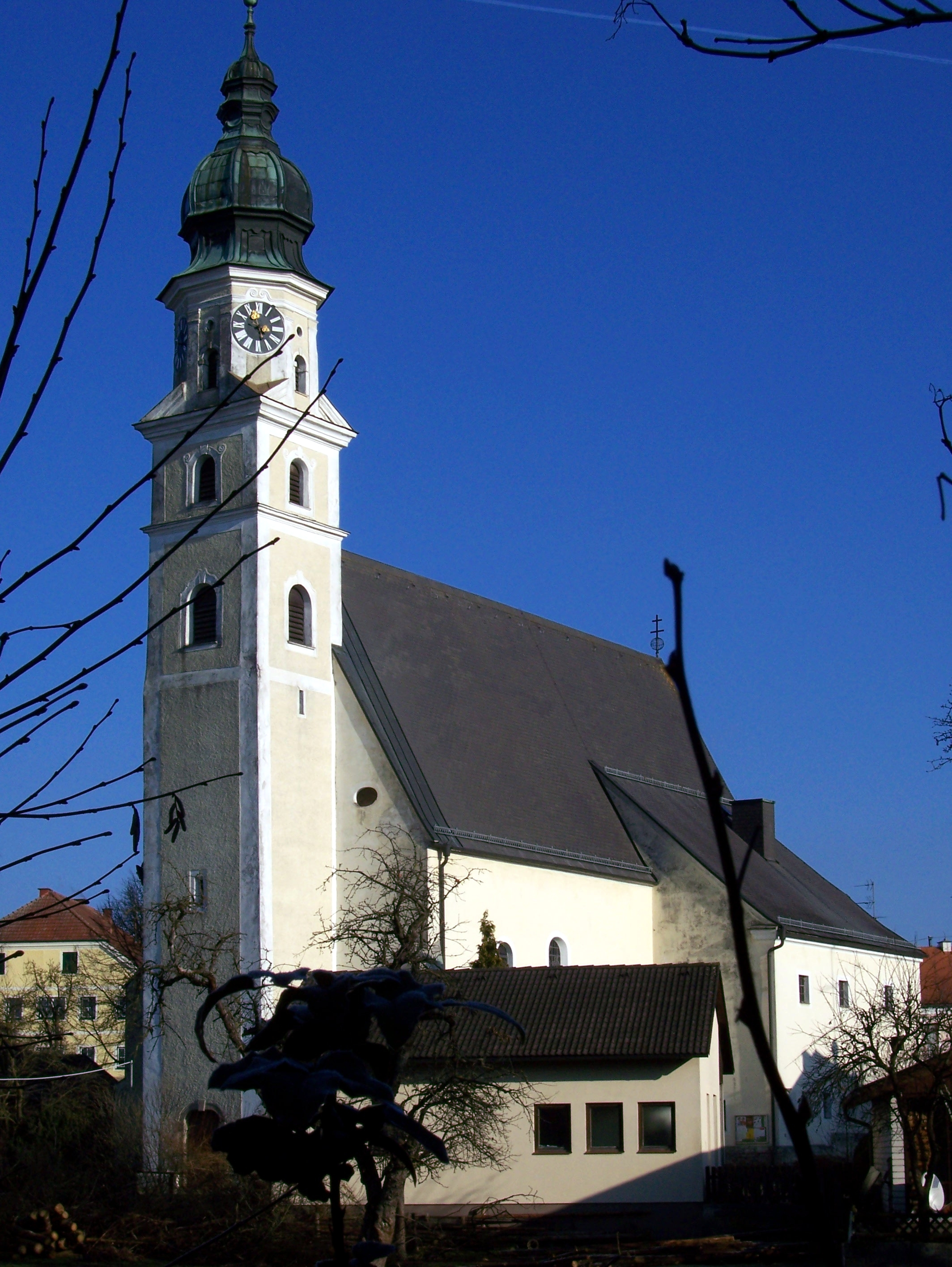 Katolika paroĥa preĝejo en St. Marienkirchen apud Schärding (Supra Aŭstrio)Unknown